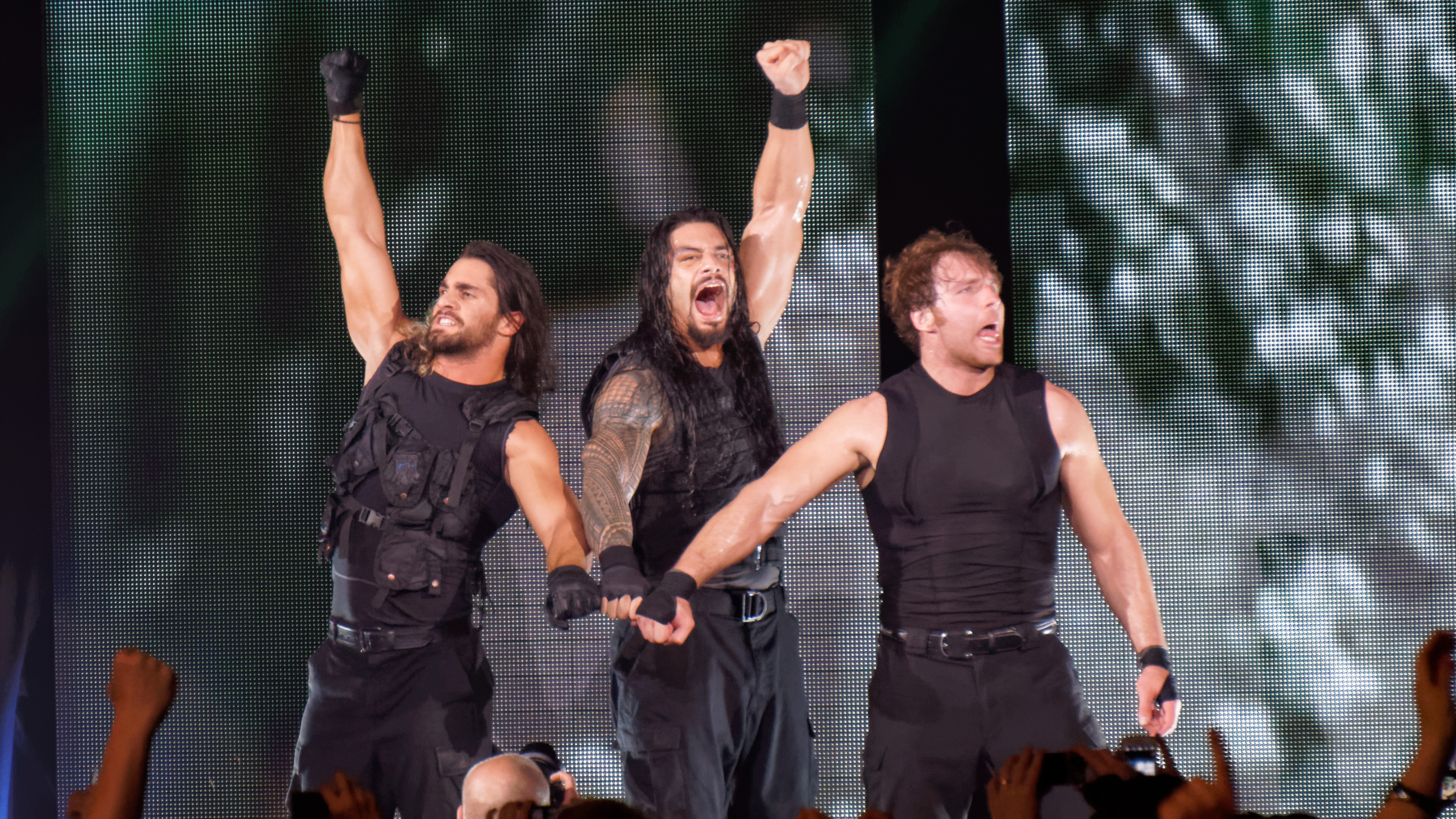 2014-05-22_22-35-17_ILCE-6000_2342_DxO